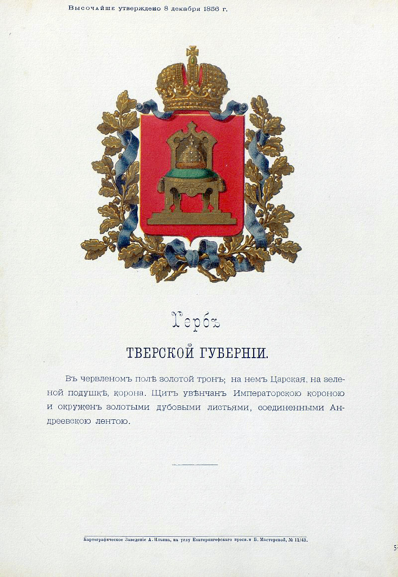 Official Russian Empire coat of arms Tver Governorate. Герб Российской Империи Тверской губернии с официальным описанием в Гербовнике Бенке. Утверждён Императором Всероссийским Александром Вторым.